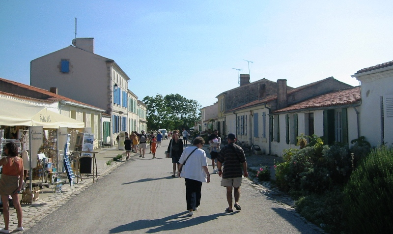 Ile d'Aix, France.